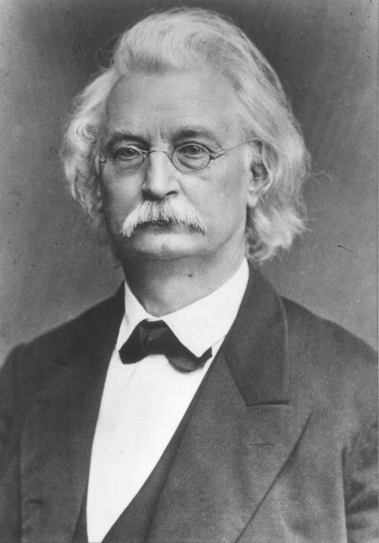 Karl Richard Lepsius (* 23. Dezember 1810 in Naumburg an der Saale, † 10. Juli 1884 in Berlin) war ein deutscher Ägyptologe und Sprachforscher. Karl (or Carl) Richard Lepsius (December 23, 1810–July 10, 1884) was a pioneering Prussian Egyptologist and linguist and pioneer of modern archaeology.